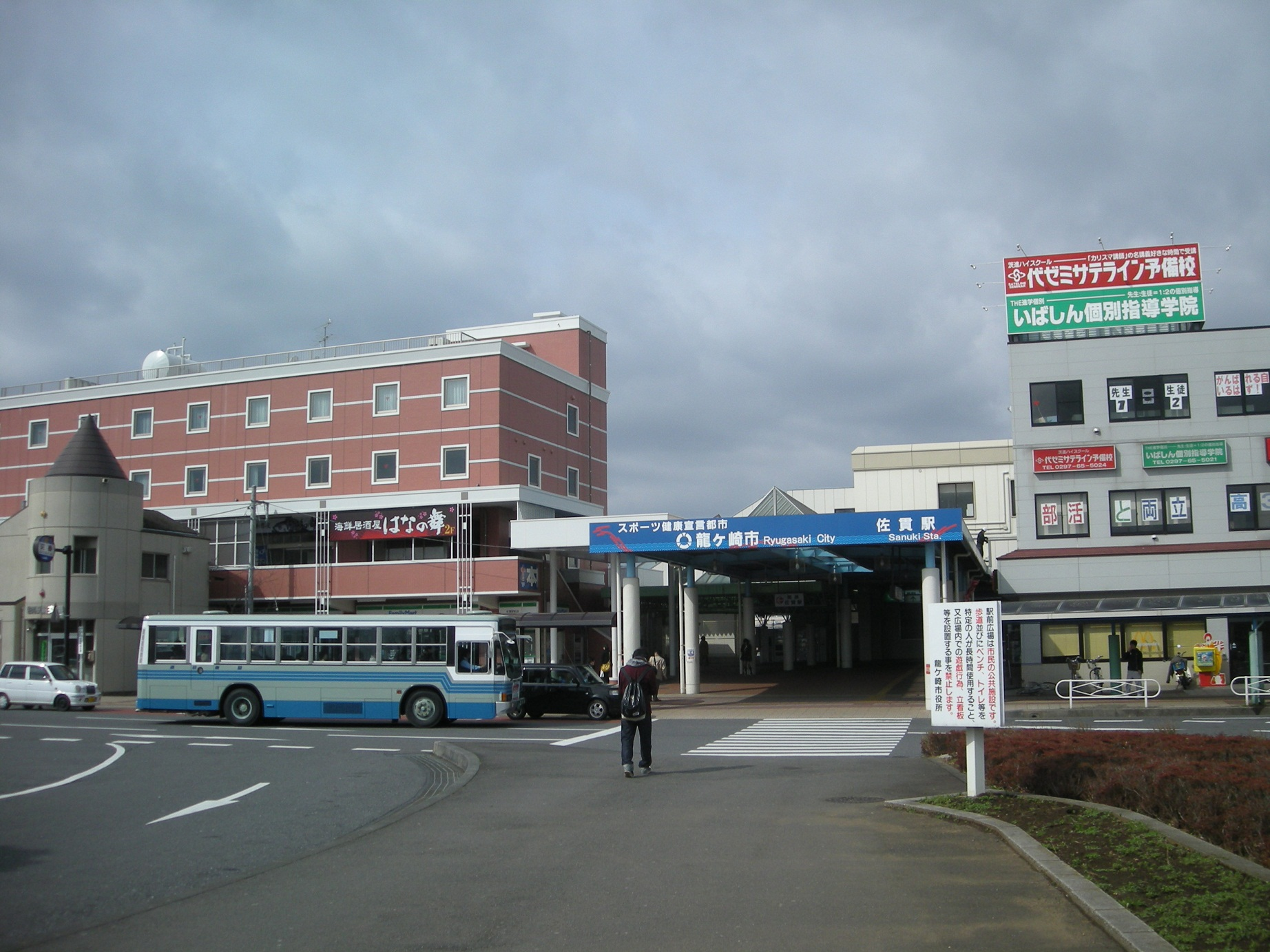 佐貫駅東口（茨城県龍ケ崎市）